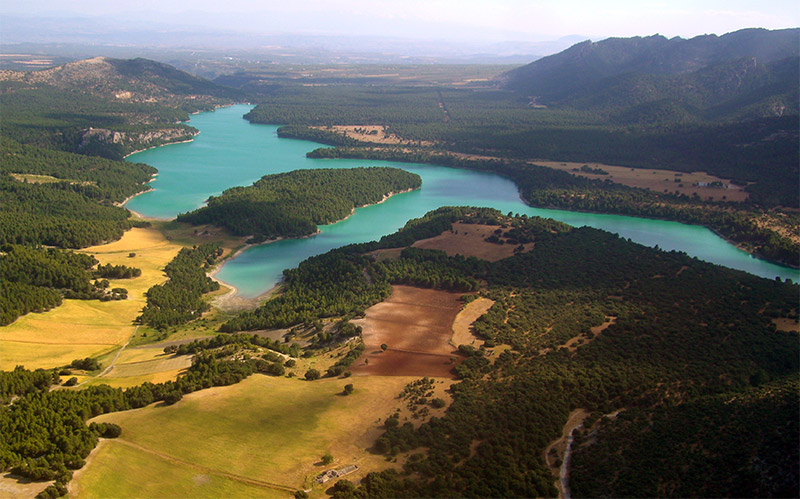 Foto aérea del Embalse de La Bolera, Pozo Alcón, Jaén